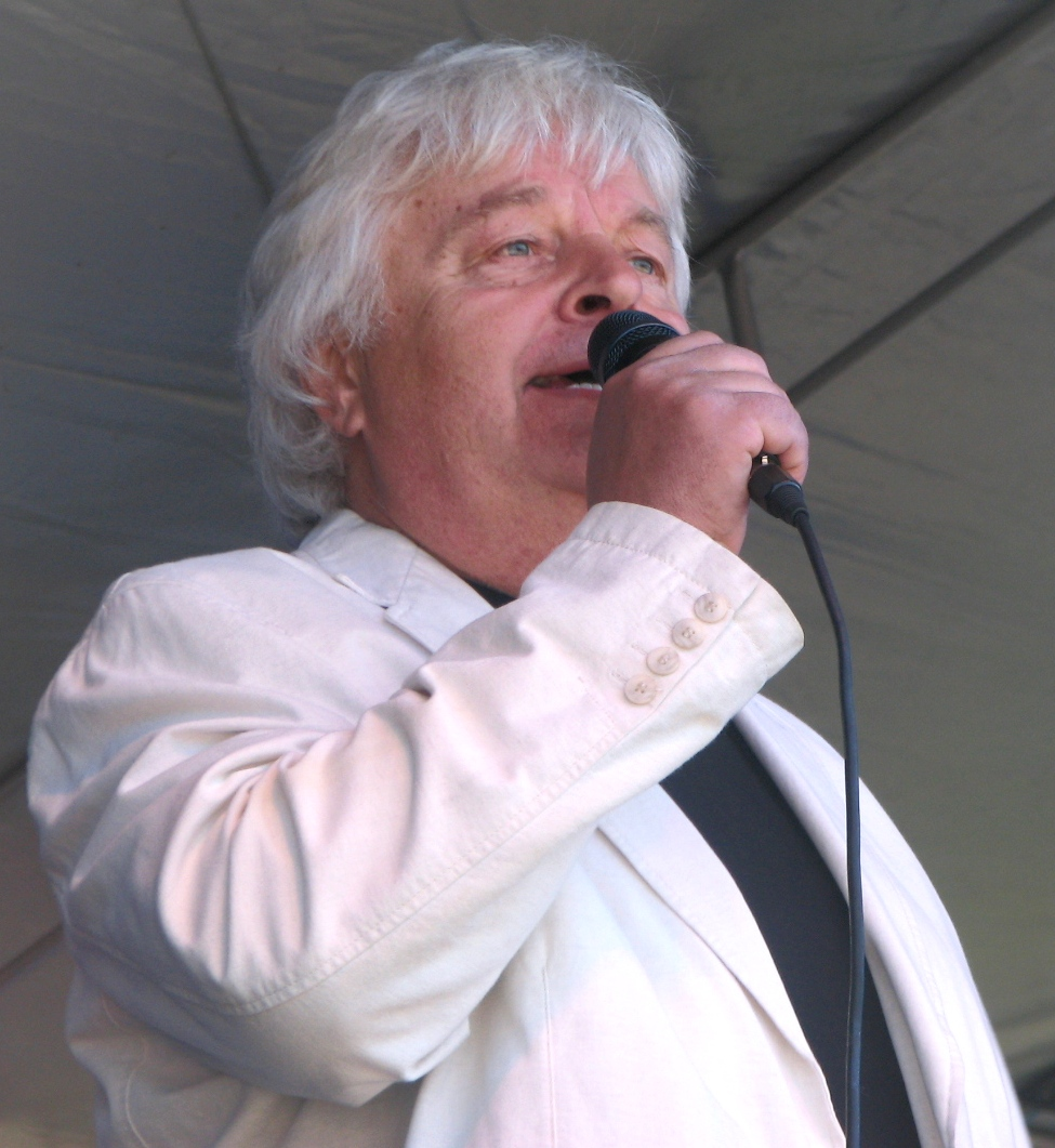 Ivo Linna esinemas Heateo festivalil Tammsaare pargis